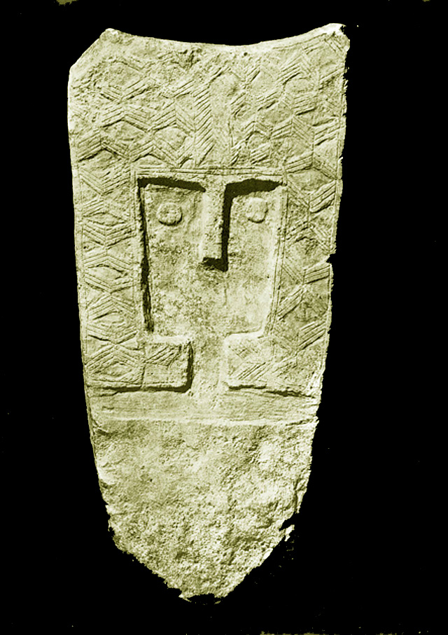 Stèle de Lauris, (-3000 / -2800) Civilisation de Lagozza